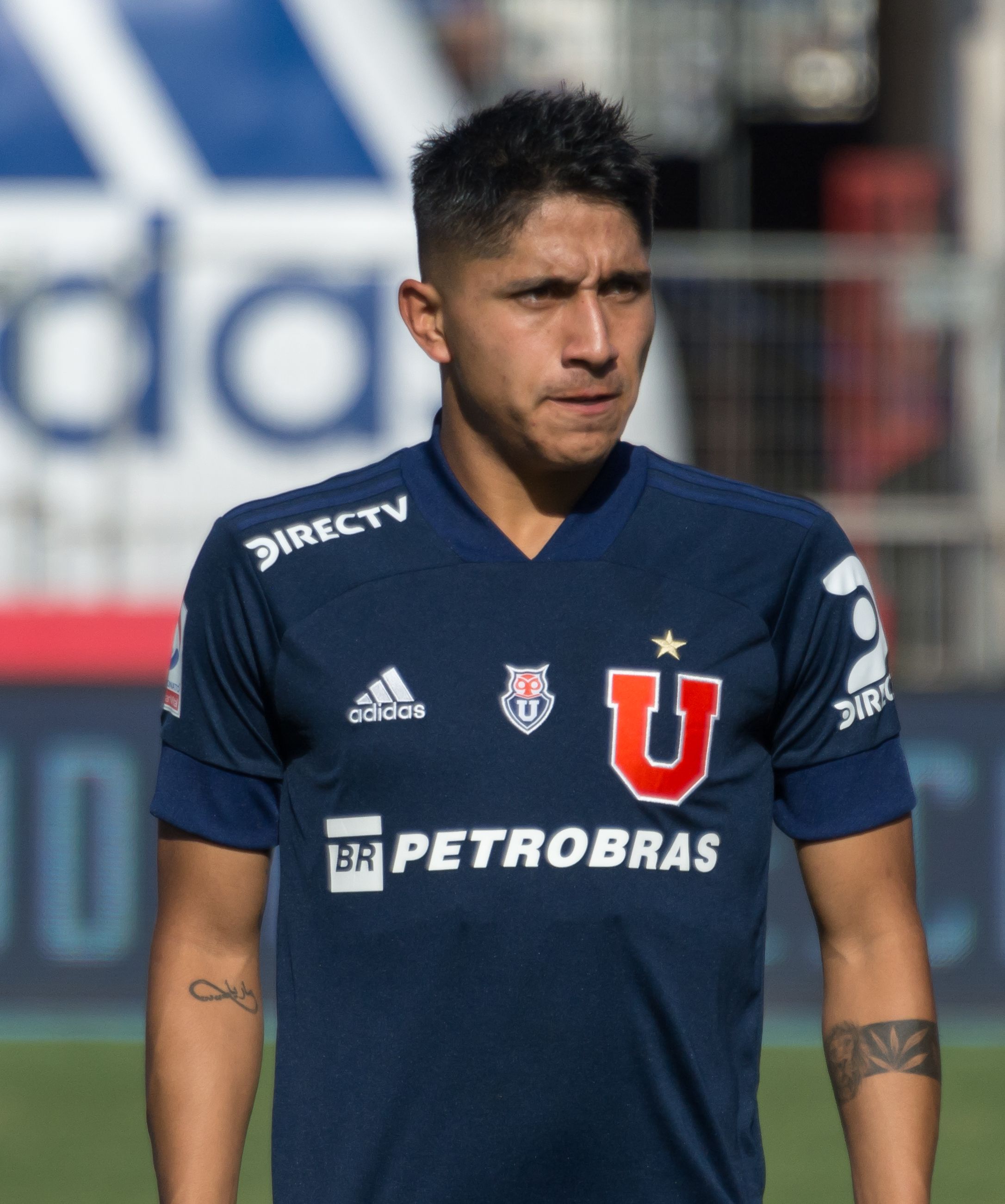 Universidad de Chile v Unión La Calera, Estadio Nacional, Ñuñoa, Santiago, Región Metropolitana, Chile